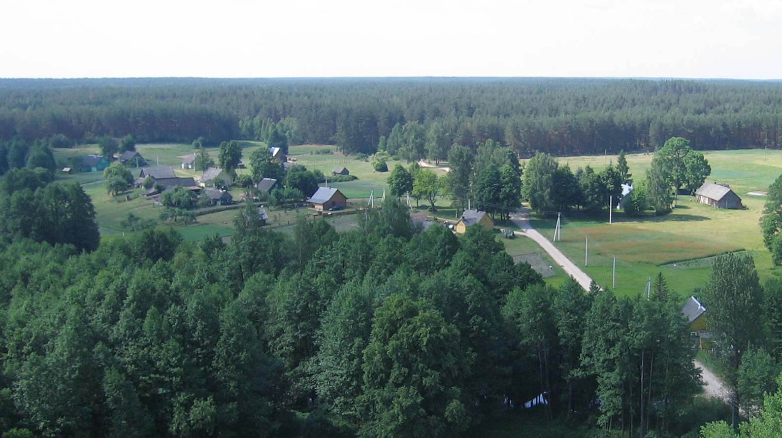 Ivoškai, Lazdijų raj.